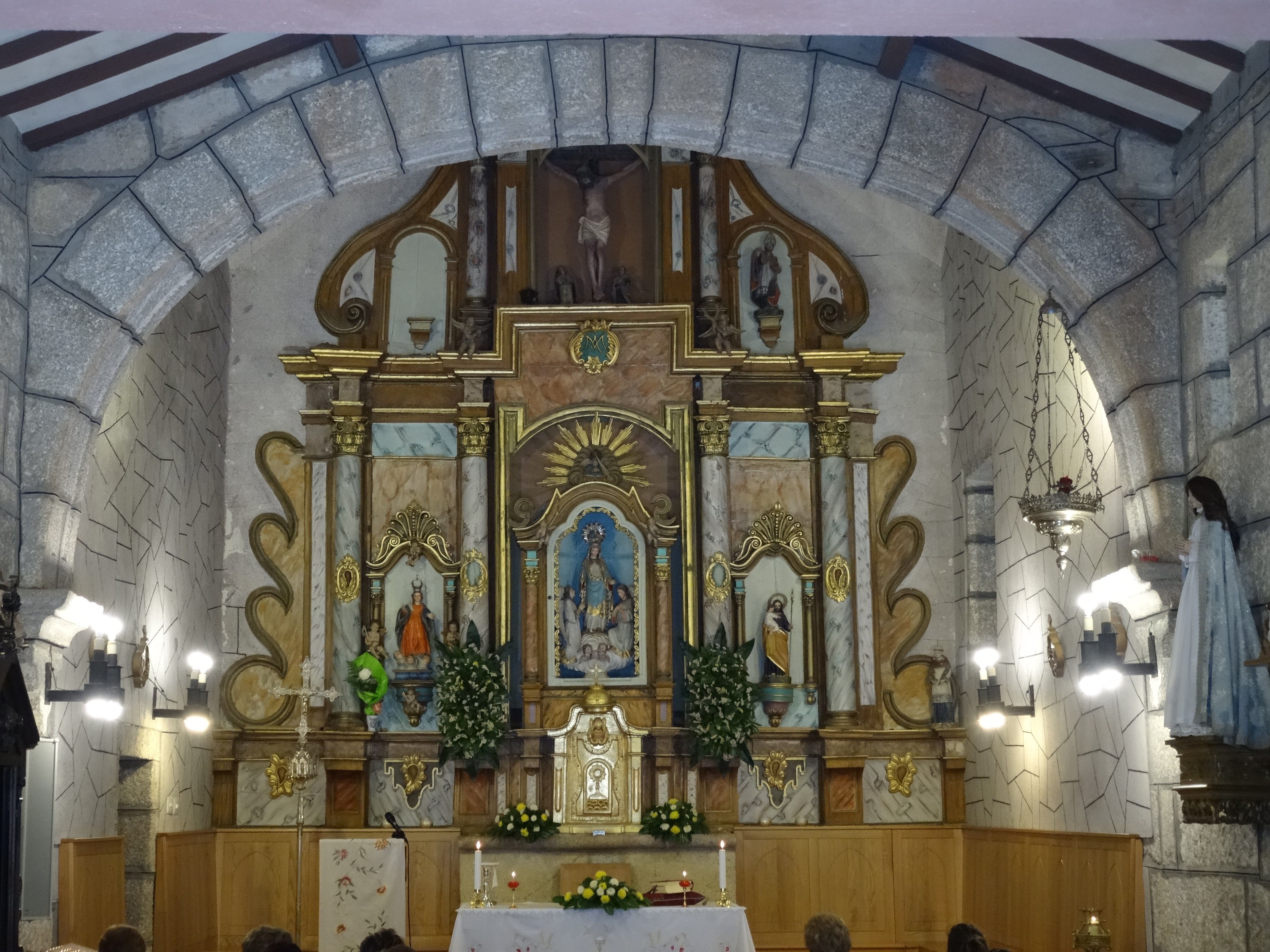 Ver título.